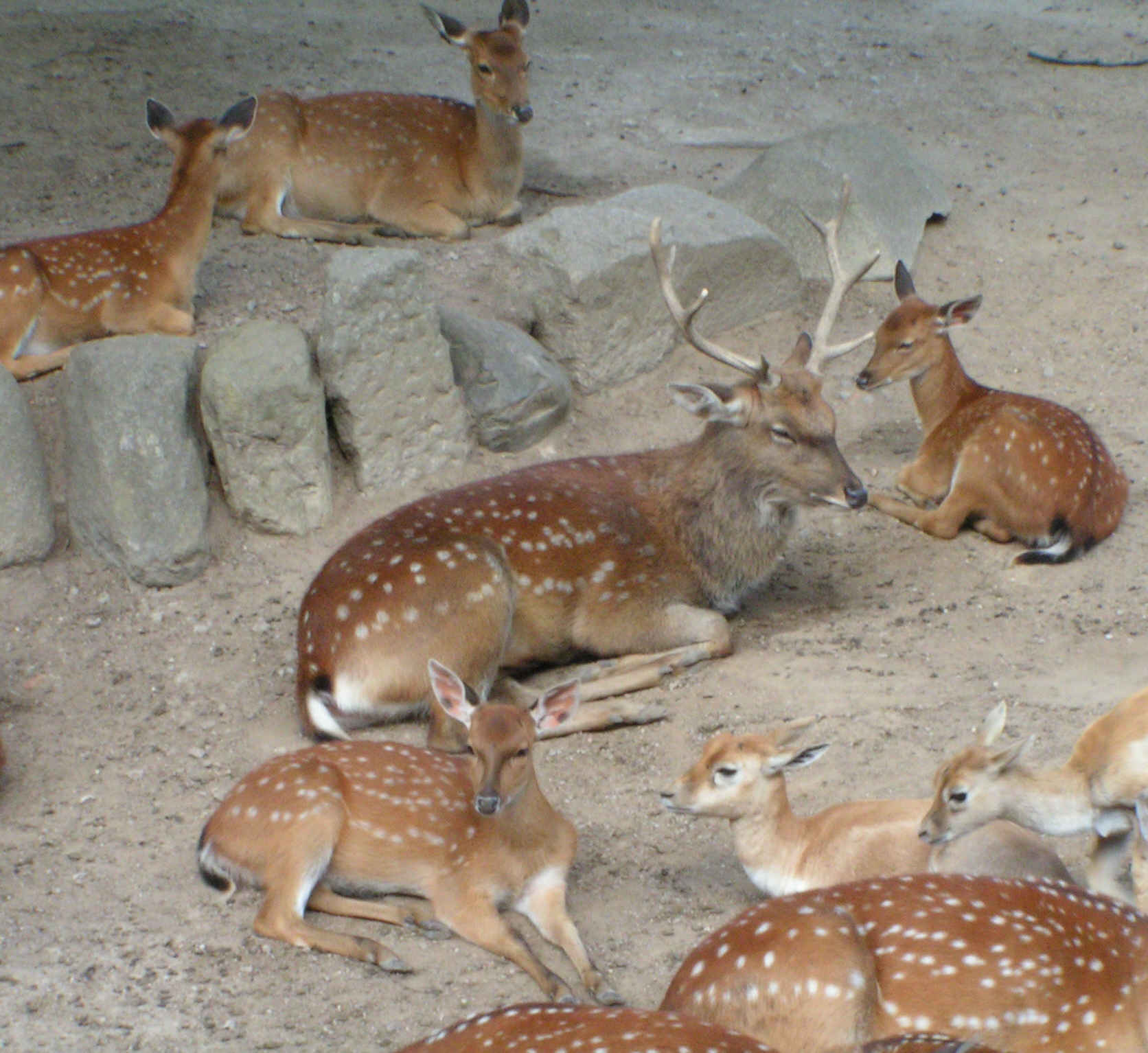 Gruppe Vietnam-Sikahirsche